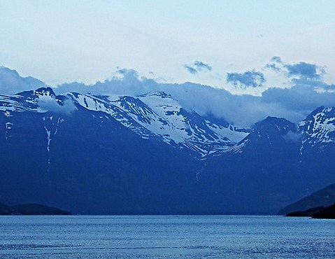 Dronningkrona (Vinnufjell) in the center, seen from Sunndalsfjorden